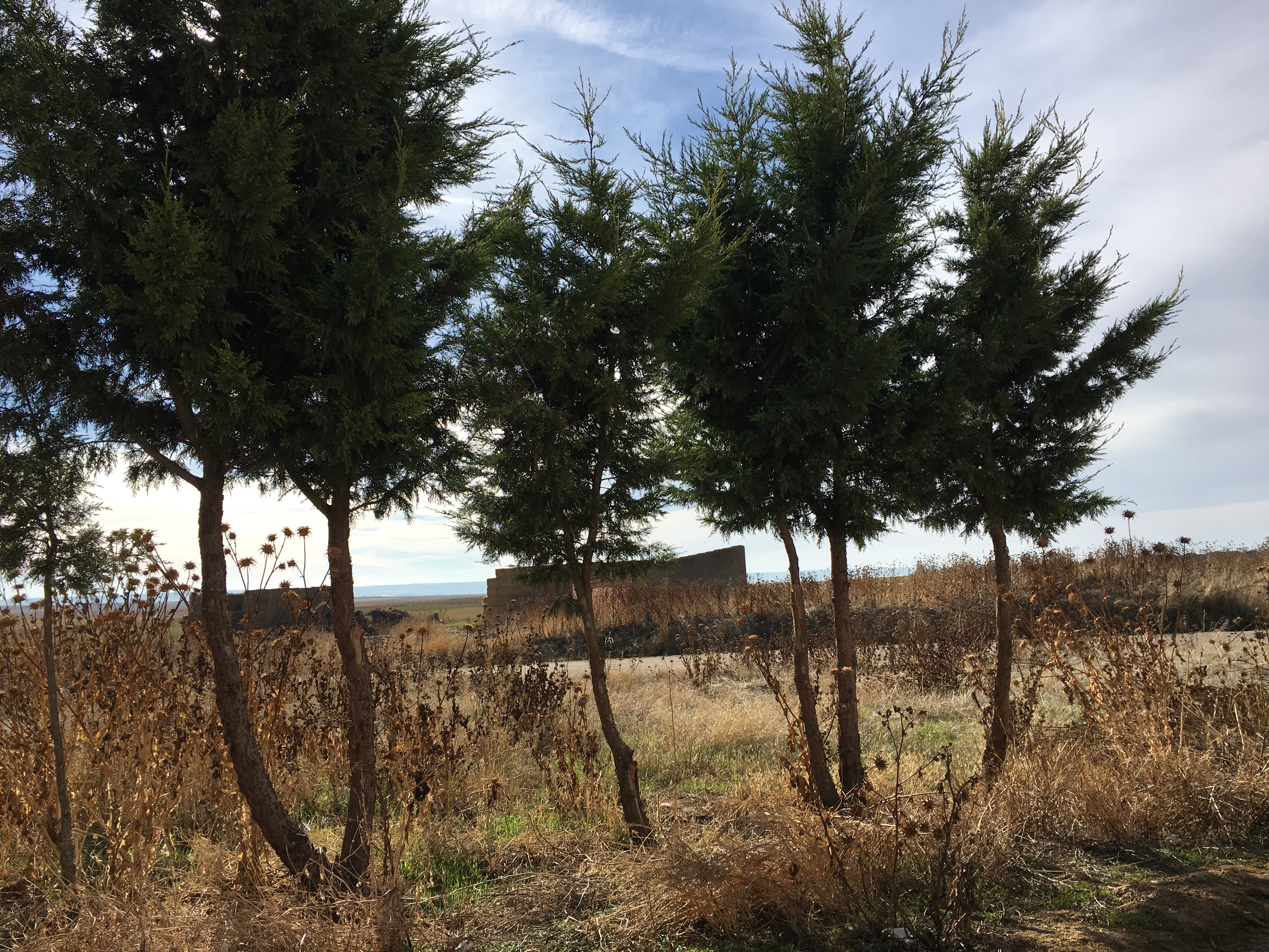 Villaesper Milenario